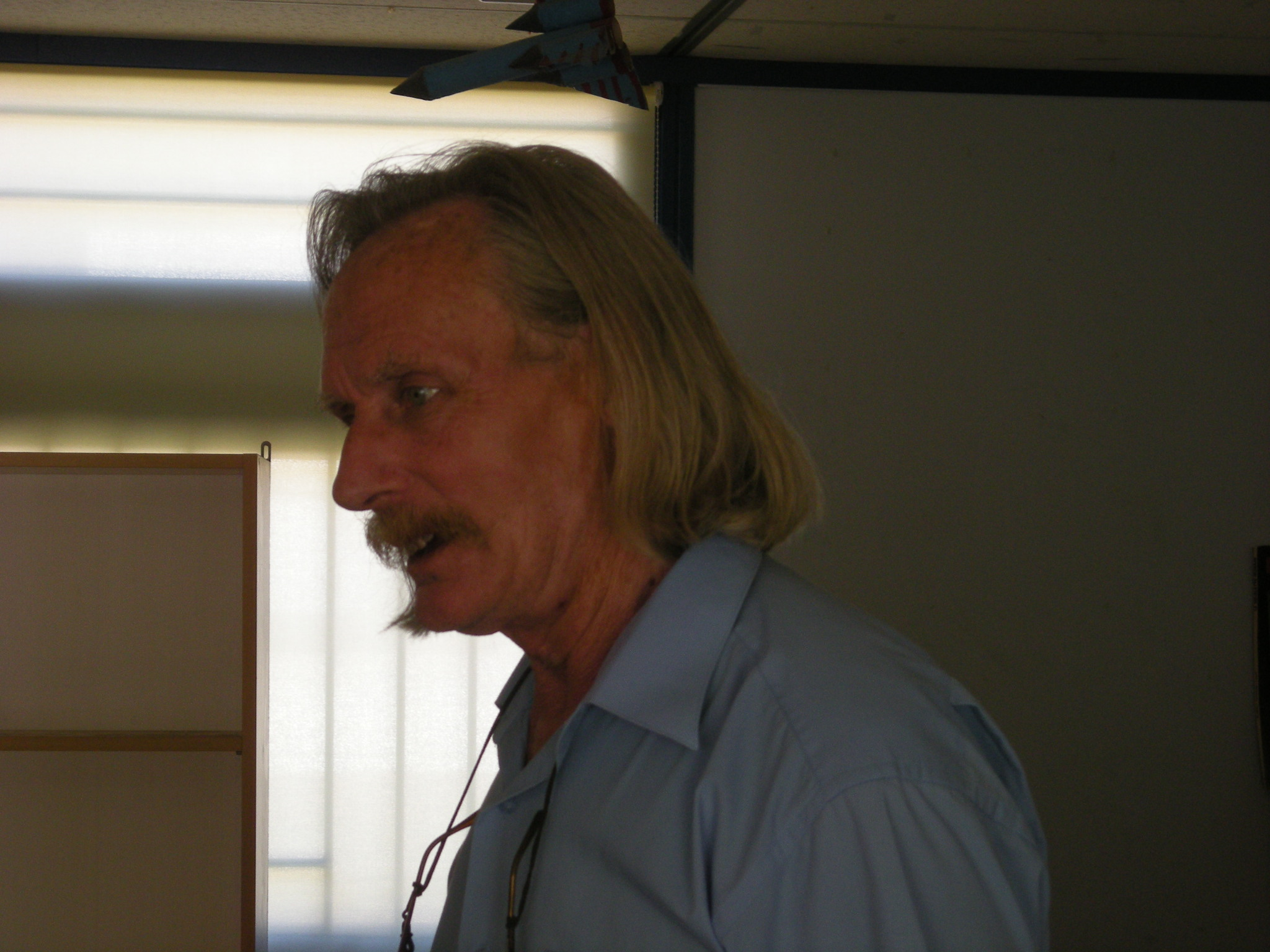 Joan Pere le Bihan. Bressola maternal i Infantil d'El Soler.